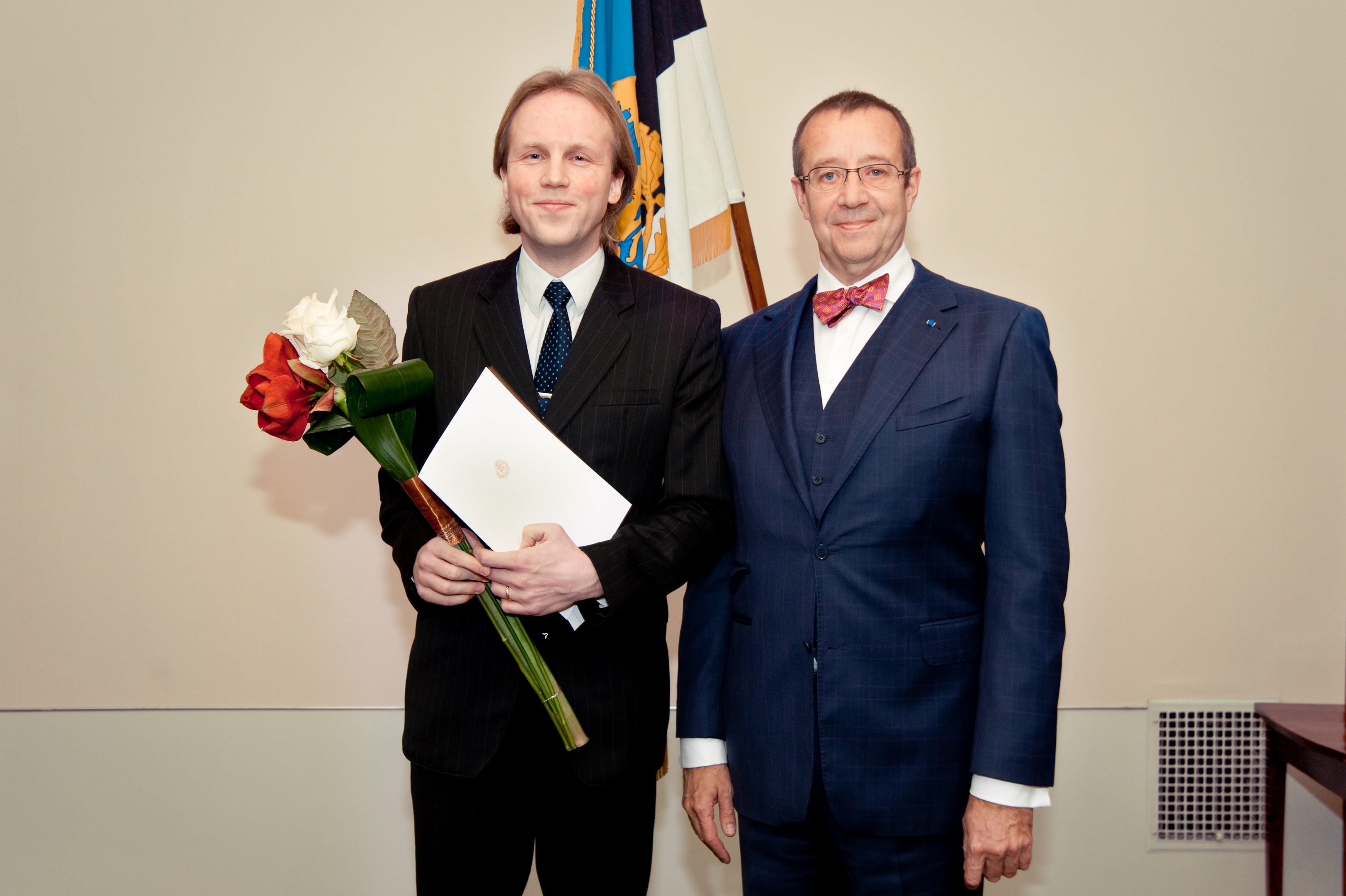 Noore teadlase preemia üleandmine Peeter Lauale.